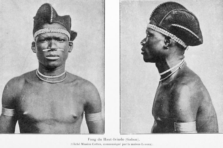 Fang du Haut-Ivindo (Gabon). From Esquisse générale des langues de l'Afrique et plus particulièrement de l'Afrique française. Par M. Delafosse (published 1914).